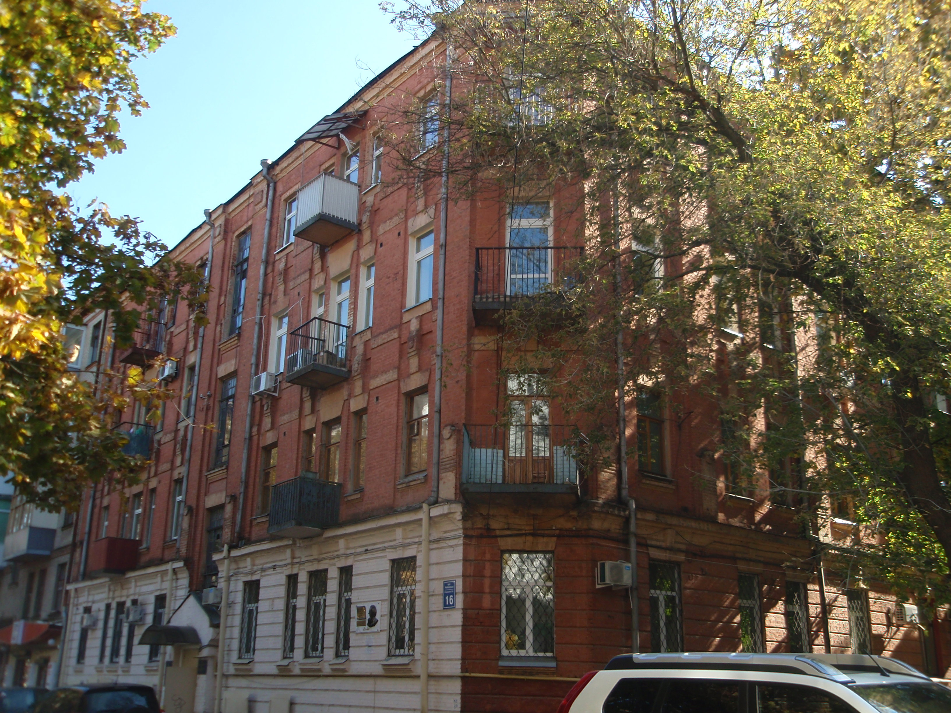 Житловий будинок, Харків, вул. Чайковська, 16